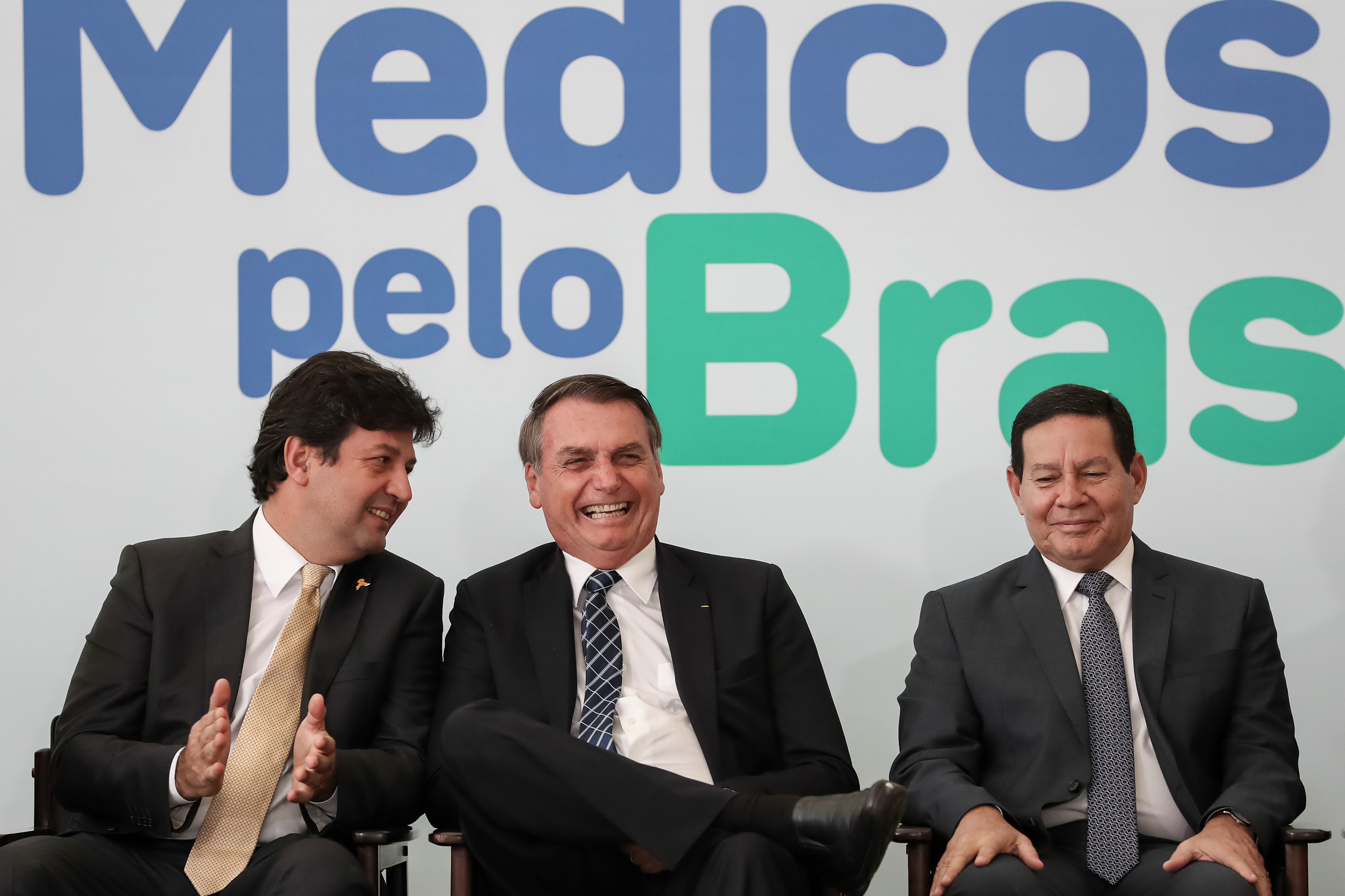 (Brasília - DF, 01/08/2019) Cerimônia de Lançamento do Programa Médicos pelo Brasil. Foto: Marcos Corrêa/PR